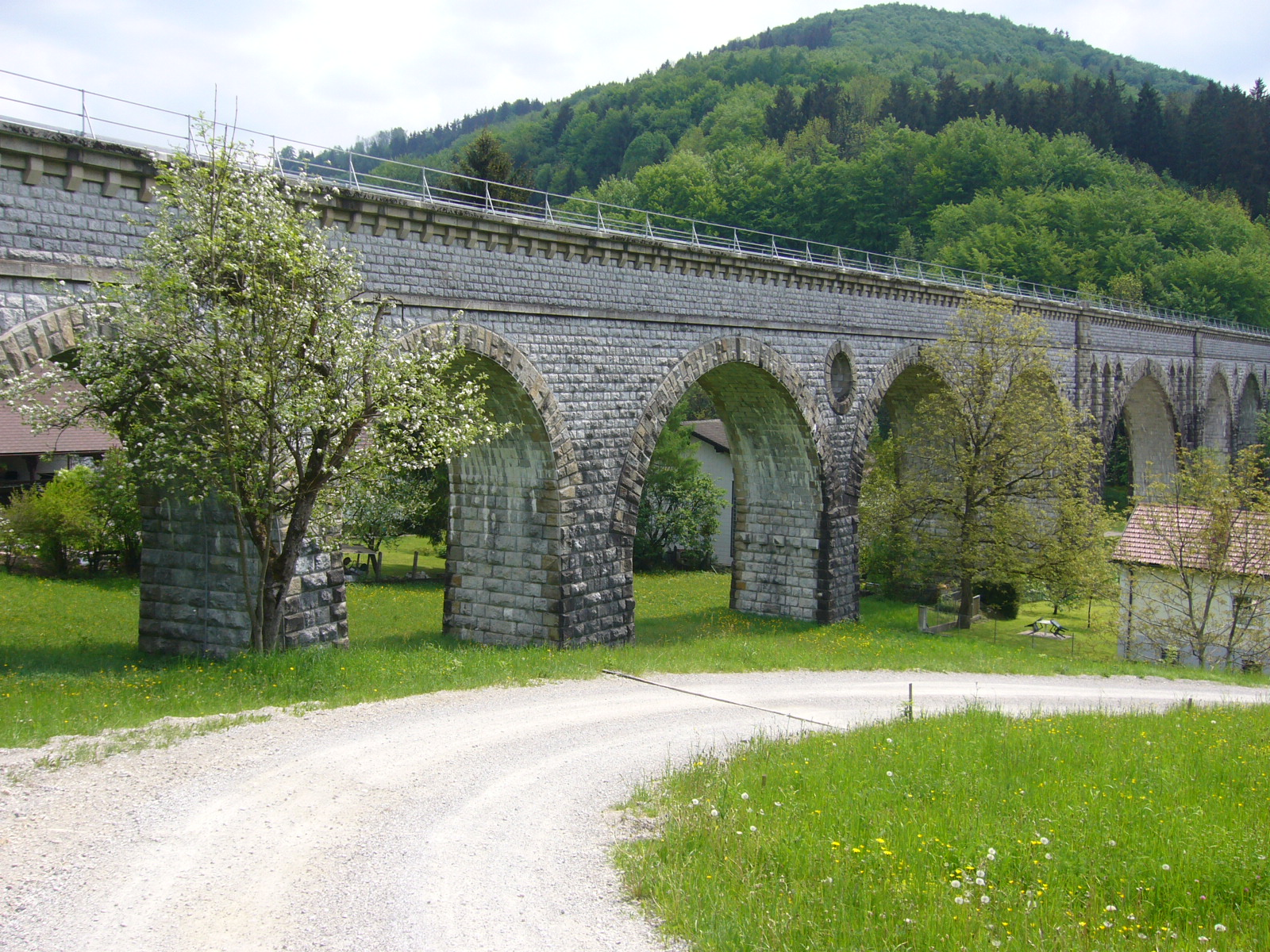 Luegeraquädukt bei St. Anton/Jessnitz und Scheibbs – 2.wr. hochquellen